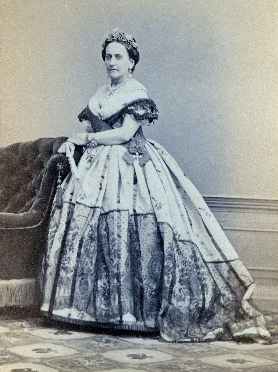 I.O. Anverso, manuscrito: ""Princesa de Iturbide." Reverso, manuscrito: "Princesa de Iturbide, hija de D. Agustín. Dña Josefa 162" (sic).